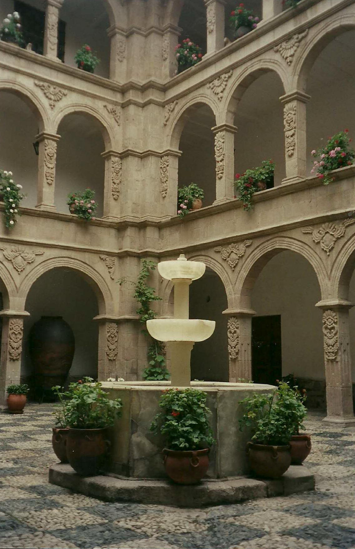 Interior del Museo Nacional de Arte de La Paz.